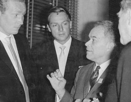 Moskau, Aufführung "Nackt unter Wölfen", Gespräch Zentralbild-Eckleben 16.7.1963 Moskau III. Internationales Filmfestival (7.- 21. Juli 1963) Aufführung des Films "Nackt unter Wölfen" Mit starkem Beifall wurde am 15. Juli im Kongreßpalast des Kremls der Wettbewerbsbeitrag der DDR zu den Moskauer Filmfestspielen "Nackt unter Wölfen" aufgenommen. UBz: Nach der Vorstellung beglückwünscht der bekannte sowjetische Regisseur Mark Donskoi die Künstler aus der DDR. Von links: Frau Donskoi, Regisseur Frank Beyer, Kameramann Günter Marczinkowsky, Mark Donskoi, Joachim Mückenberger und Professor Hans Rodenberg, Stellvertreter des Ministers für Kultur der DDR (im Vordergrund) →This file has been extracted from another file: Bundesarchiv Bild 183-D0716-0050-001, Moskau, Aufführung "Nackt unter Wölfen", Gespräch.jpg Abgebildete Personen: Beyer, Frank: Regisseur, DDR (GND 119217899) Donskoi, Mark: Filmregisseur, Sowjetunion Rodenberg, Hans Prof.: Intendant Theater der Freundschaft, Direktor DEFA-Filmstudio, DDR Marczinkowsky, Günter: Kameramann bei der DEFA, DDR